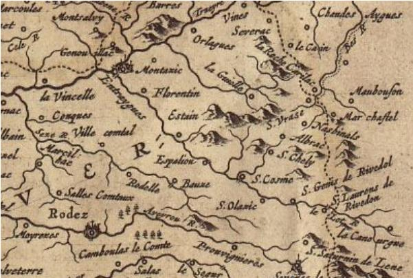 carte de l'Aubrac du XVIIeme édition Hollandaise(bnf gallica)